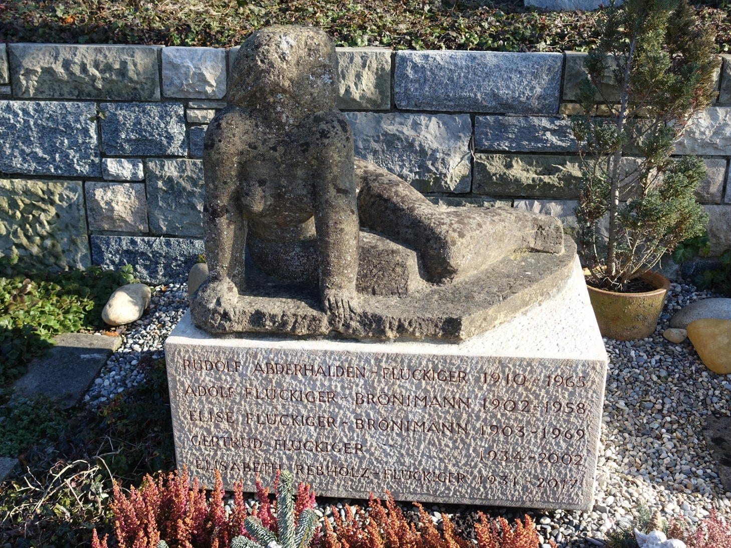 Rudolf Abderhalden-Flückiger (1910–1965), Physiologe und Pathologe. Familiengrab auf dem Sankt Margarethen Friedhof (Nord) in Binningen